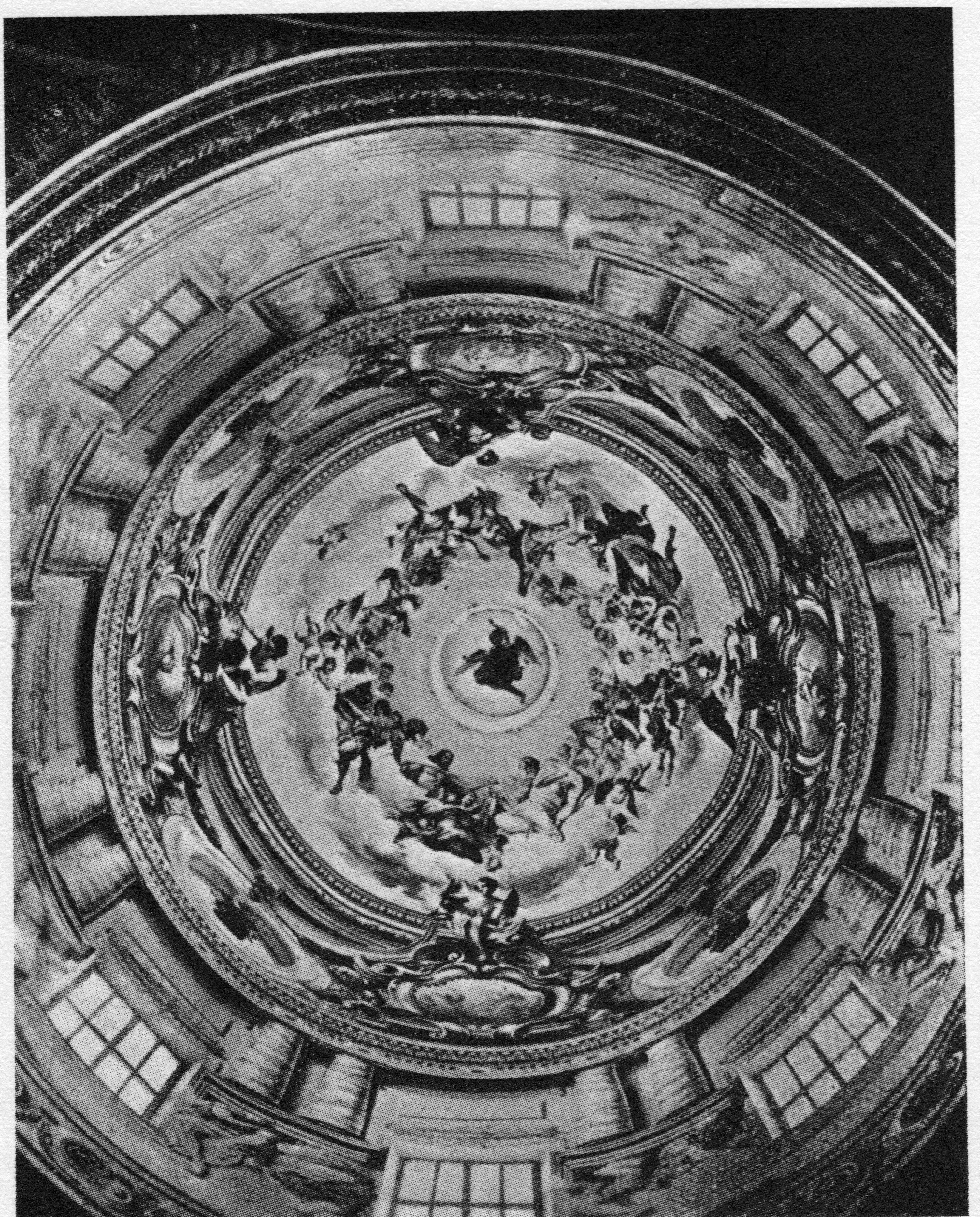 Interno della Cupola del santuario, dipinto da Caula nel 1681 e rifatto da Malatesta nel 1866. Marchese Ludovico Coccapani feudatario di Spezzano e Fiorano dal 1755 al 1796. Ritratto su tela eseguito nel 1754, quando aveva 18 anni.